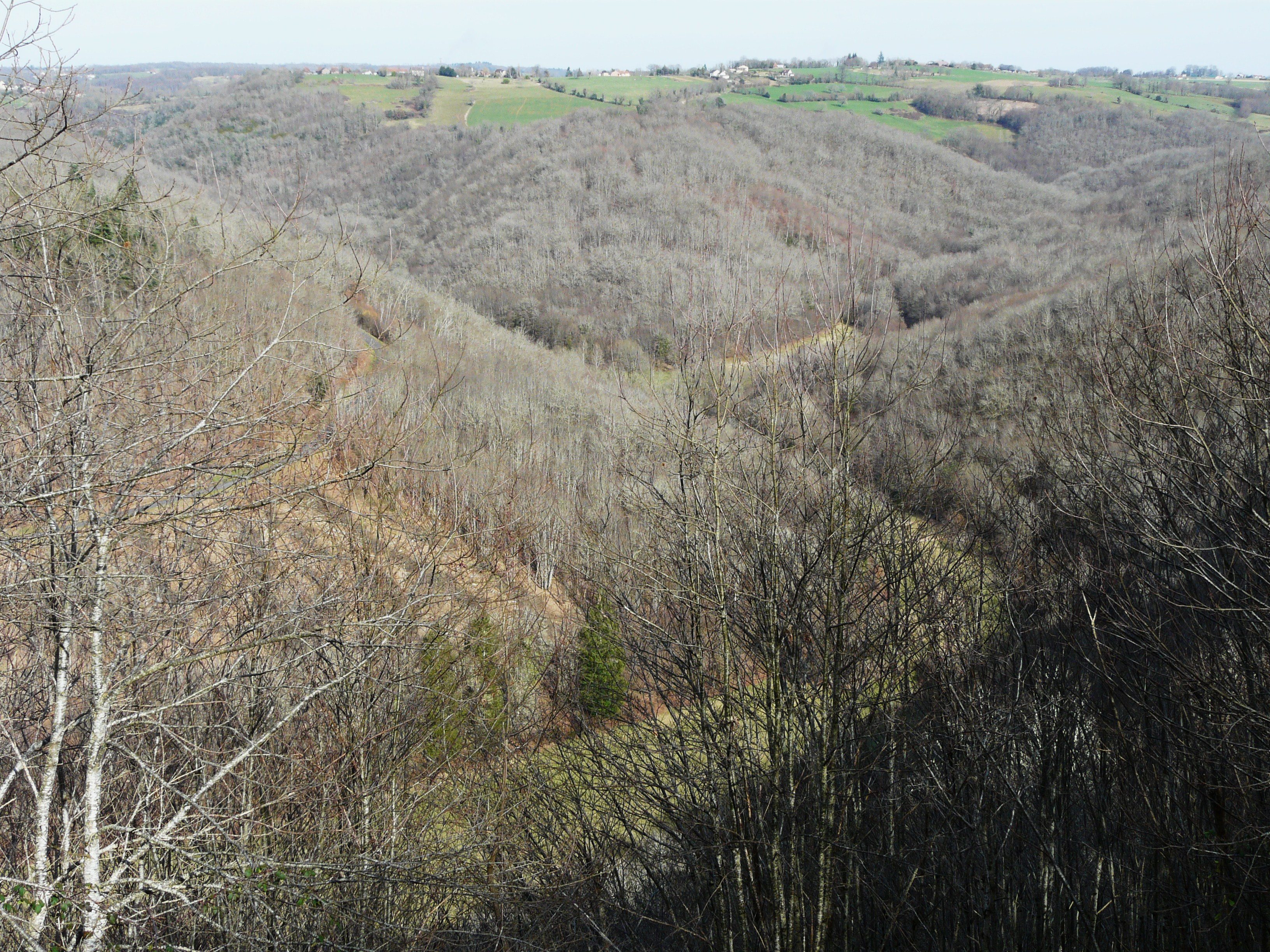 Les gorges de l'Auvézère et du ruisseau de la Forge entre les communes de Génis (au premier plan) et Saint-Mesmin (au loin, au-delà des deux vallons), Dordogne, France